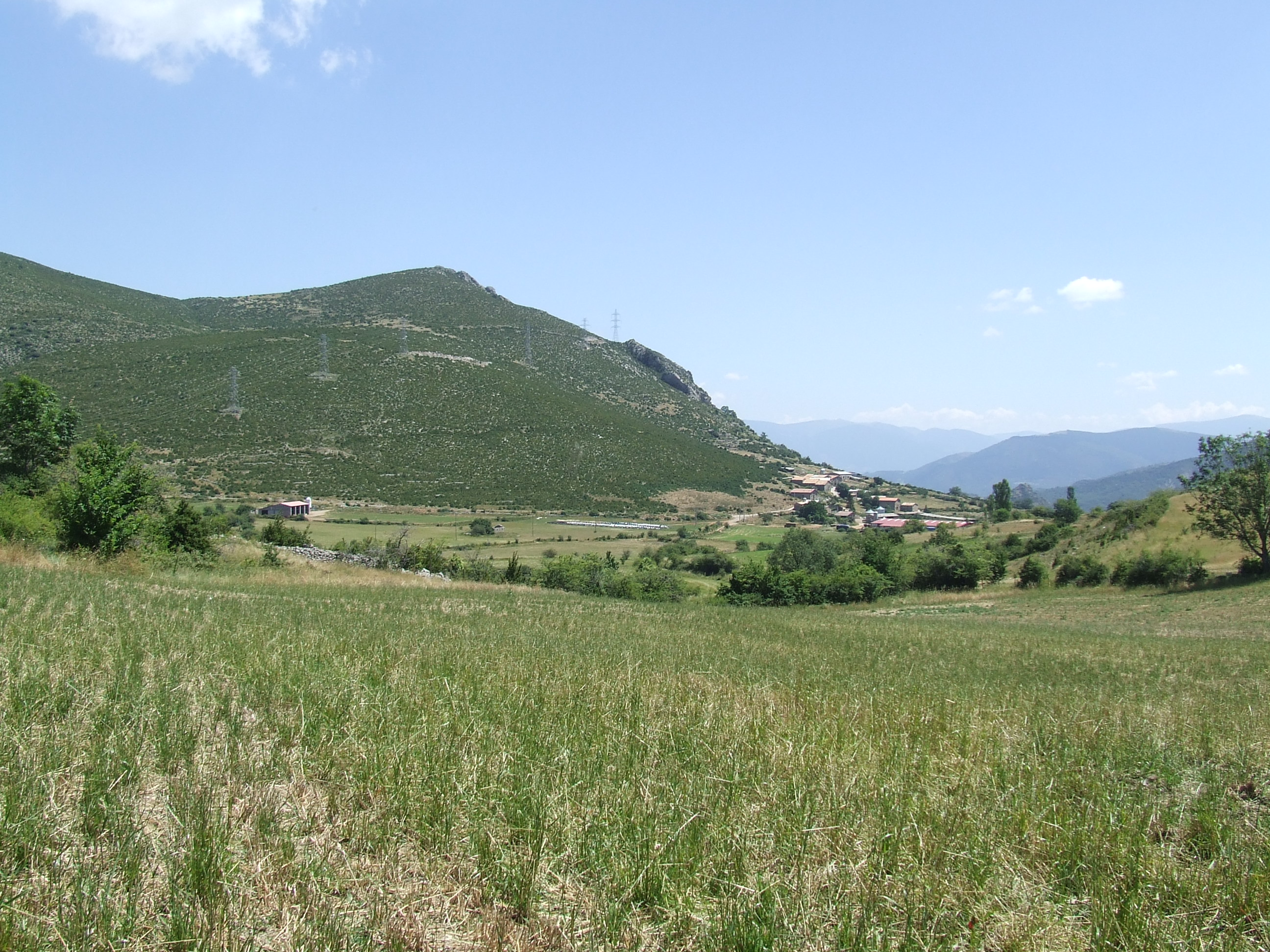 Corroncui des de prop de la Beguda d'Adons (Viu de Llevata, el Pont de Suert, Alta Ribagorça)